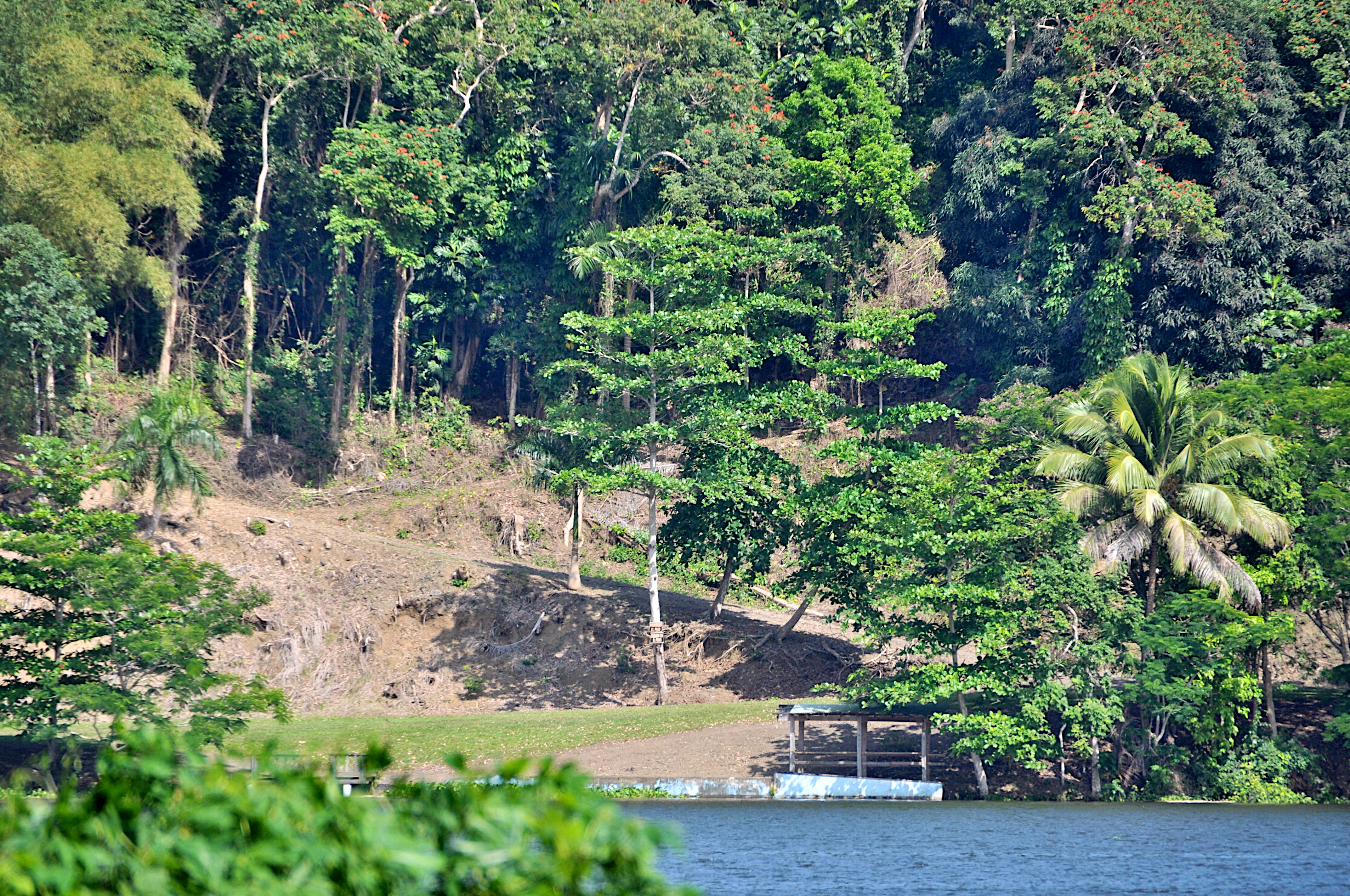 Carraízo, Trujillo Alto, Puerto Rico